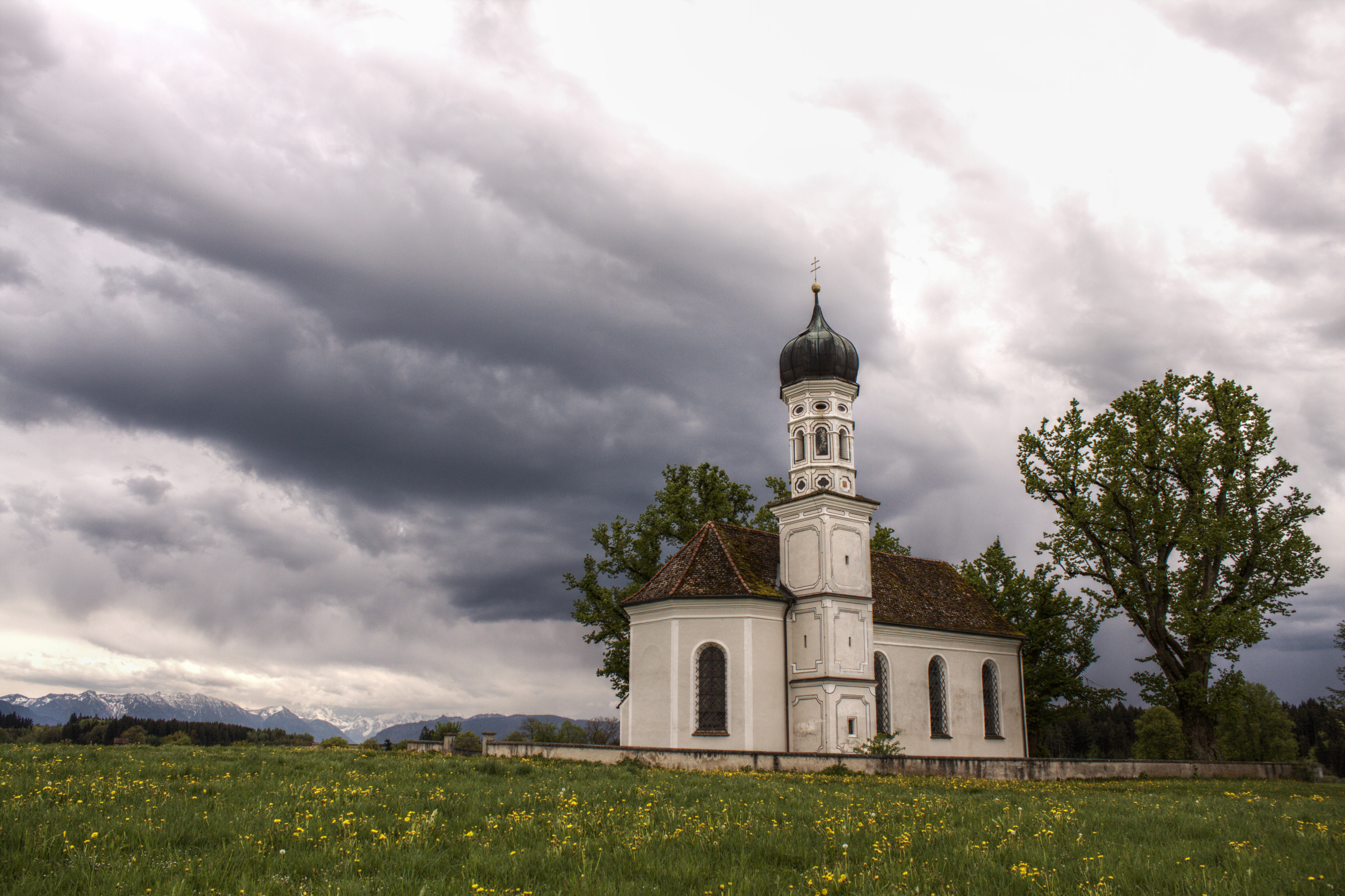 Kirche St. Andreas bei Etting, Landkreis Weilheim-Schongau, Oberbayern, tonemapped HDR